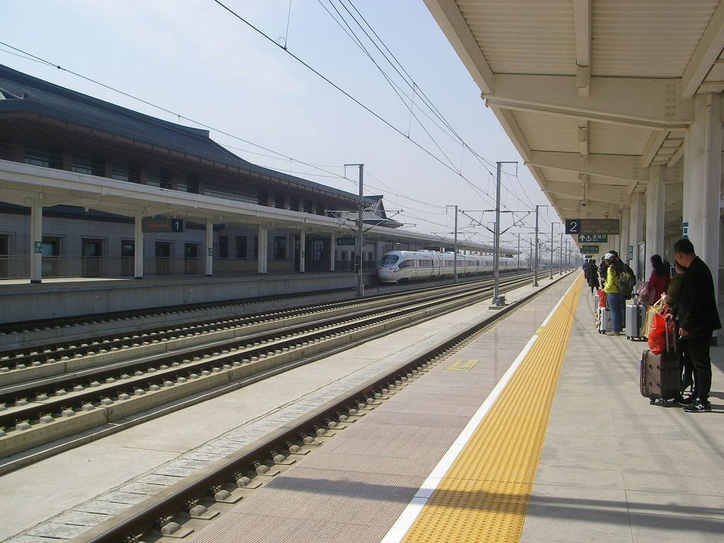 開封北駅プラットフォーム